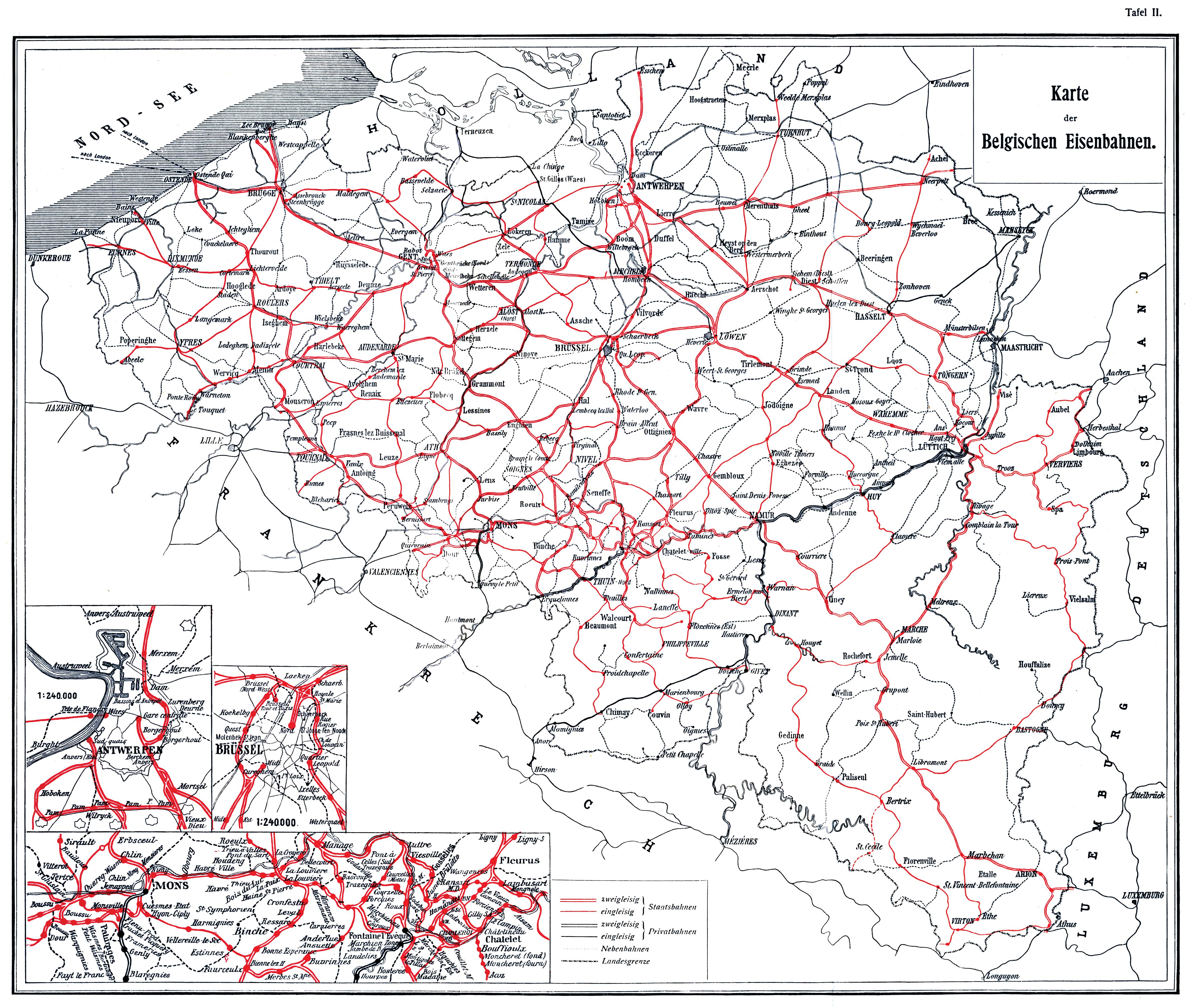 Karte der Belgischen Eisenbahnen